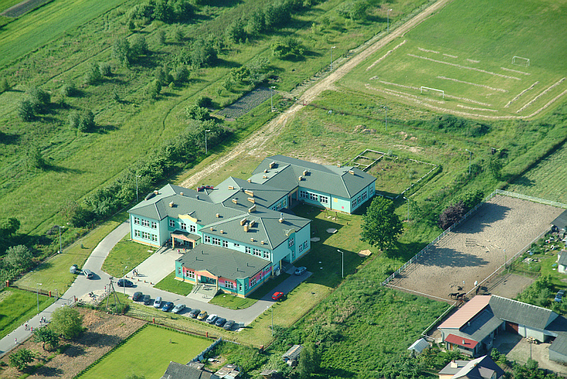 Zespół Szkół (przedszkole, szkoła podstawowa i gimnazjum) w Stojadłach. Za budynkiem widoczny zarys fundamentów pod salę gimnastyczną